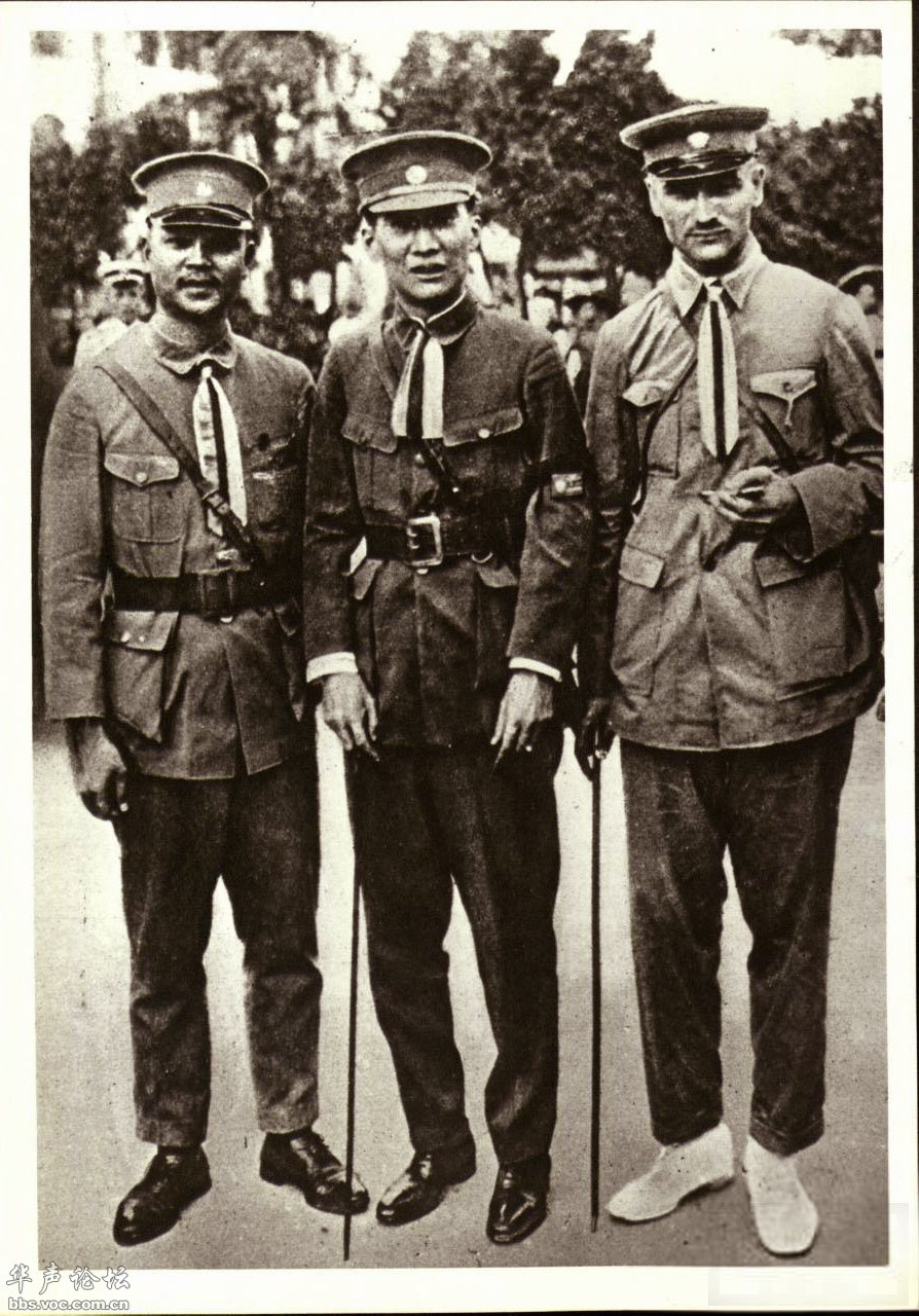 北伐期の呉鉄城(中央)。左右の者は不明。